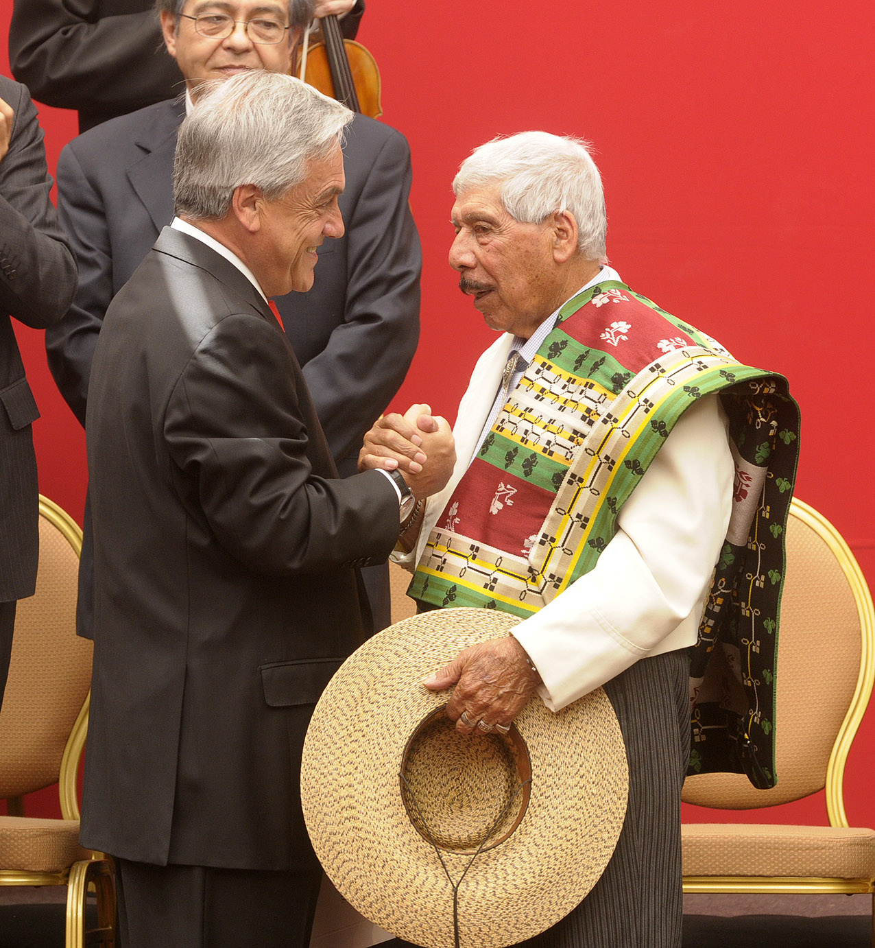 En una ceremonia realizada en el Palacio de La Moneda, el Presidente Piñera anunció el envío al Congreso en los próximos días de un proyecto de ley “que va a hacer permanente la entrega de incentivos económicos para aquellas radios u otros medios de comunicación que difundan la música chilena”.